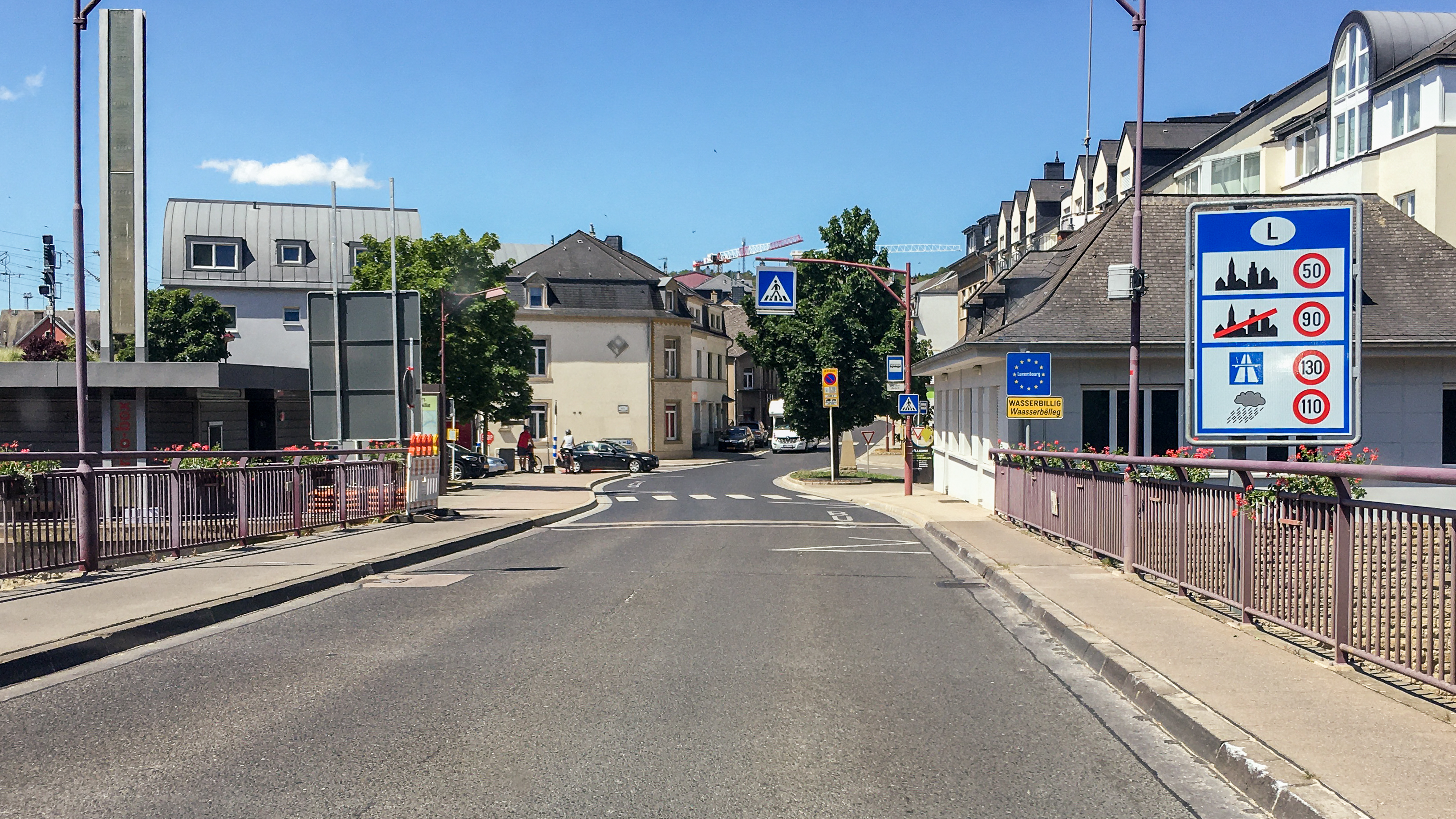 Brücke über die Sauer in Wasserbillig - Grenze Deutschland-Luxemburg